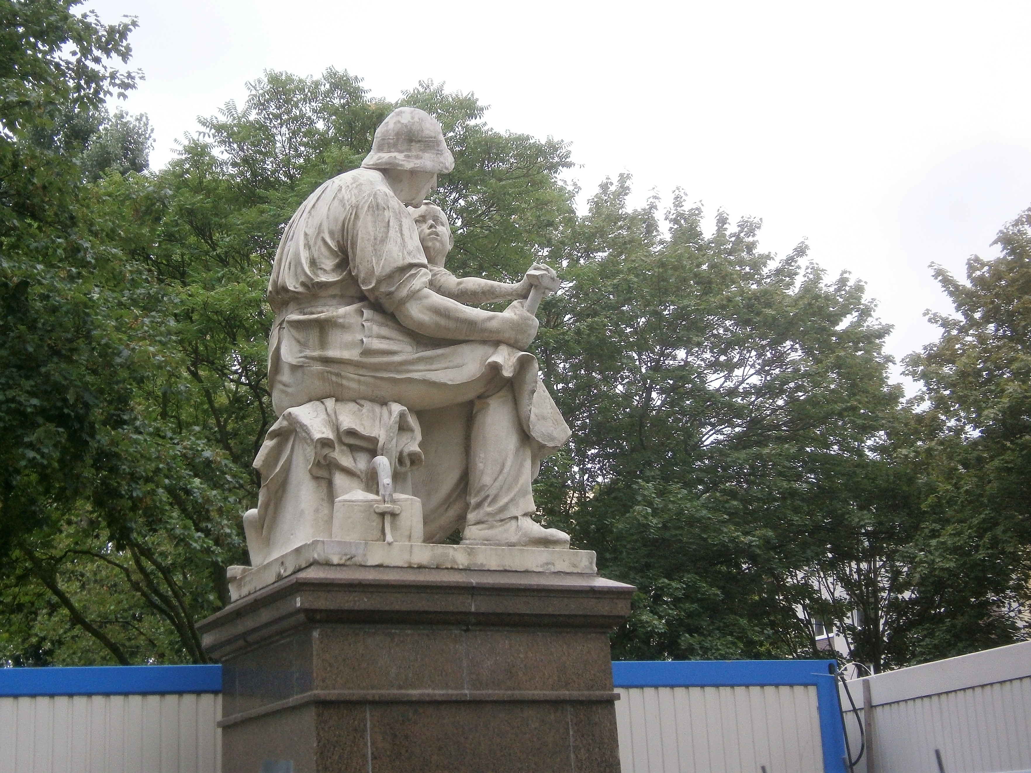 Die Andreasstraße ist eine Straße im Berliner Bezirk Friedrichshain-Kreuzberg, Ortsteil Friedrichshain. Angelegt wurde sie 1862 auf vorherigen Gartenland und 1863 benannt. Bis um 1900 waren die Grundstücke bebaut und bis 1930 wurde verdichtet. Bei Luftangriffen im Zweiten Weltkrieg wurde die Gebäude schwer getroffen. So ist die Straße seit den 1950er Jahren mit wiederhergestellten Altbauten, aber besondres durch Plattenbau-Wohnblöcke aber seit 1990 auch durch Hotel- und Bürobauten im Umfeld des Ostbahnhofs charakterieisiert. Das Bild zeigt: Die Skulptur Handwerker mit Sohn, vor Andreasstraße 21a